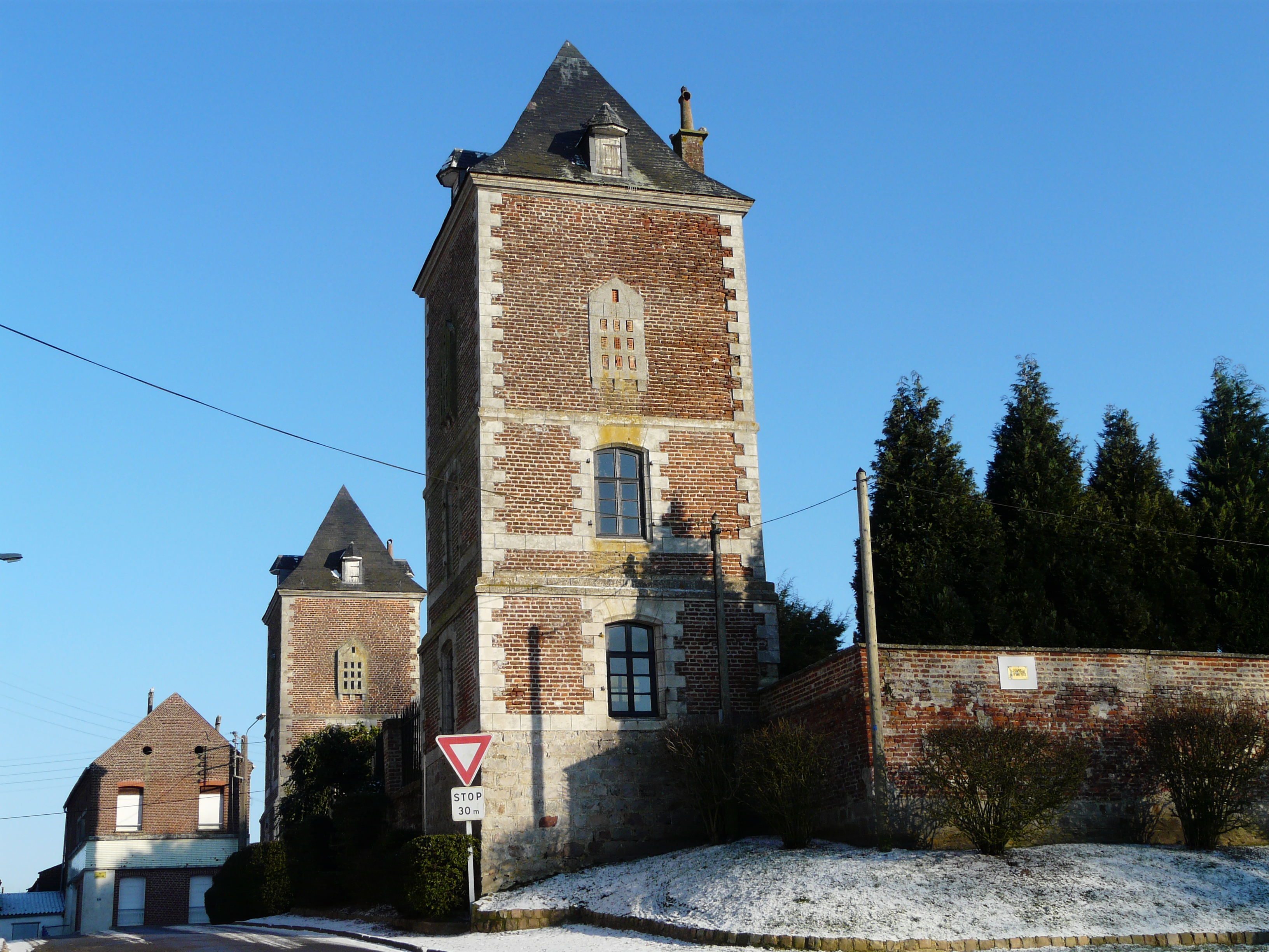 Tours de l'ancien château de Busigny